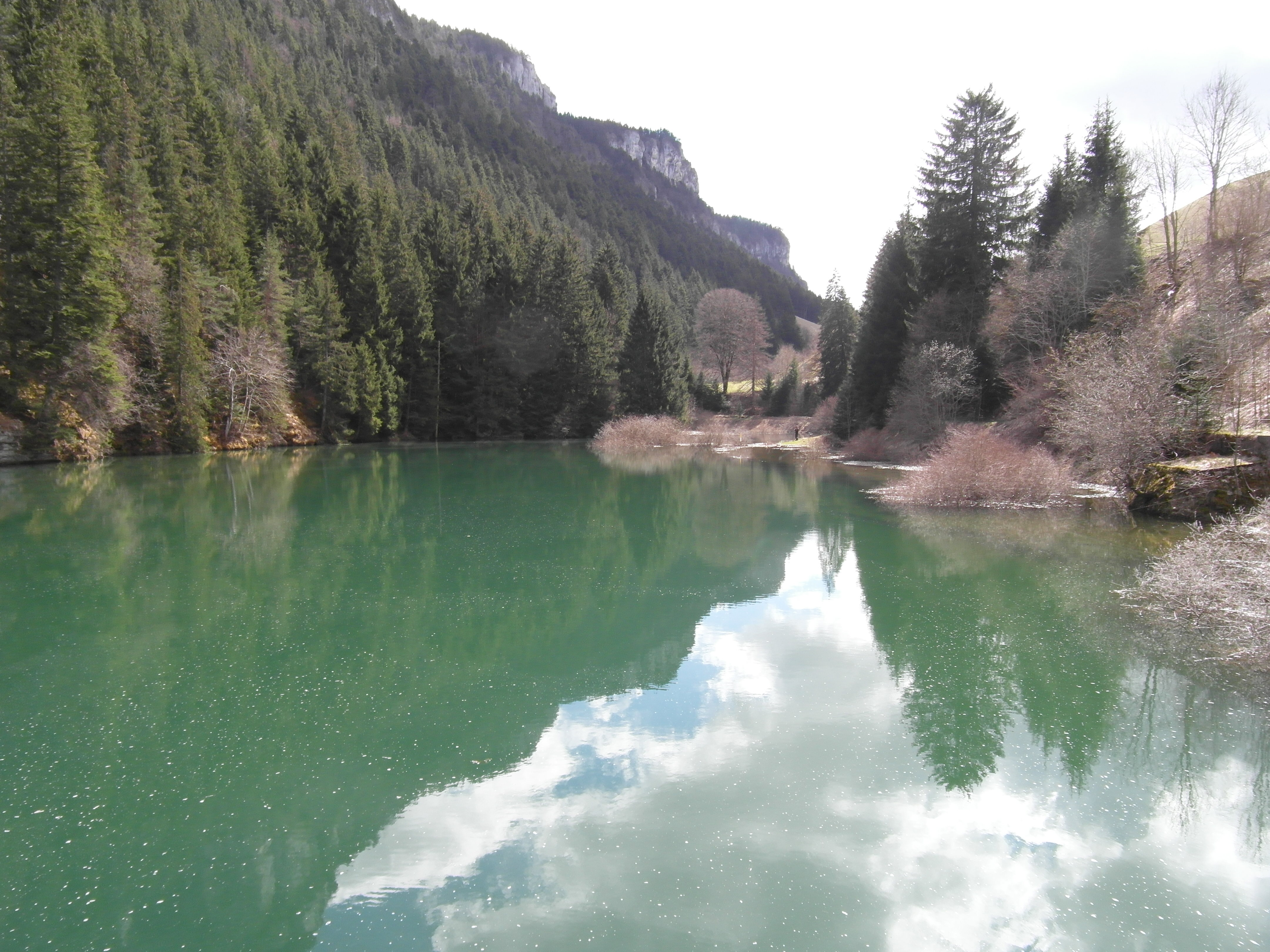 Plan d'eau d'Engins